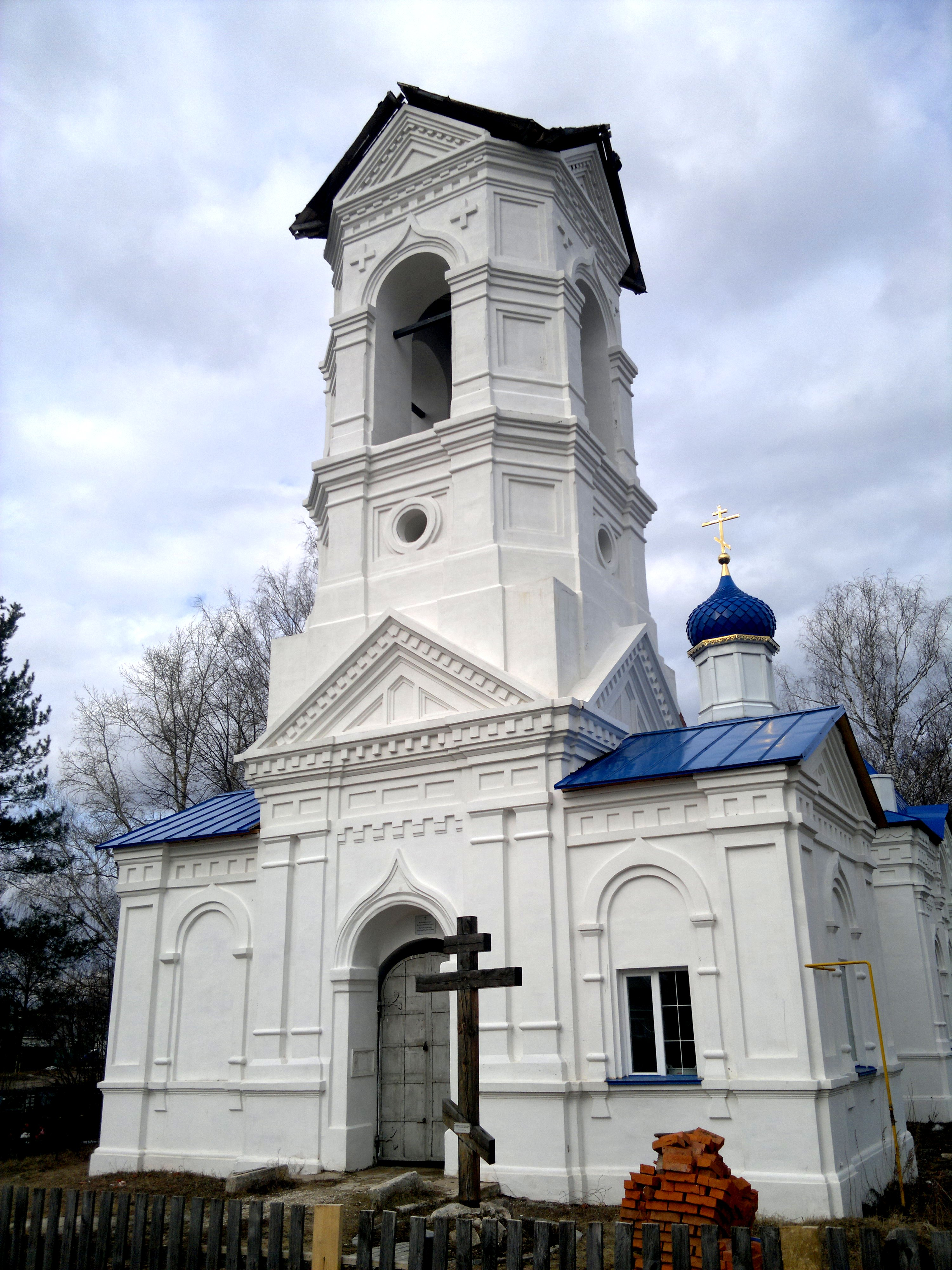 Дом культуры